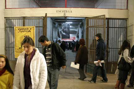 Apertura de Escotilla Nº8, 11 de septiembre de 2010.